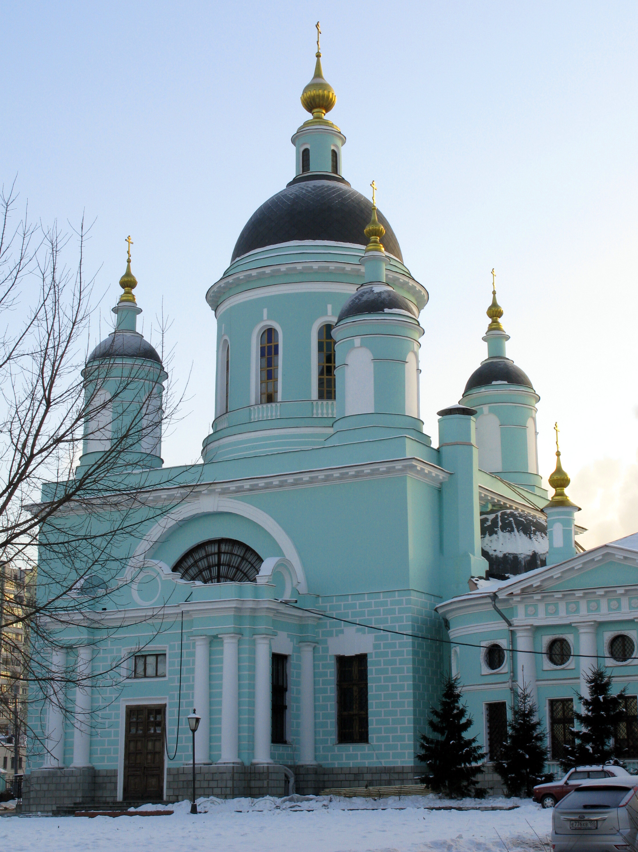 Храм преподобного Сергия Радонежского (Троицы Живоначальной) в Рогожской слободе, что в Гонной